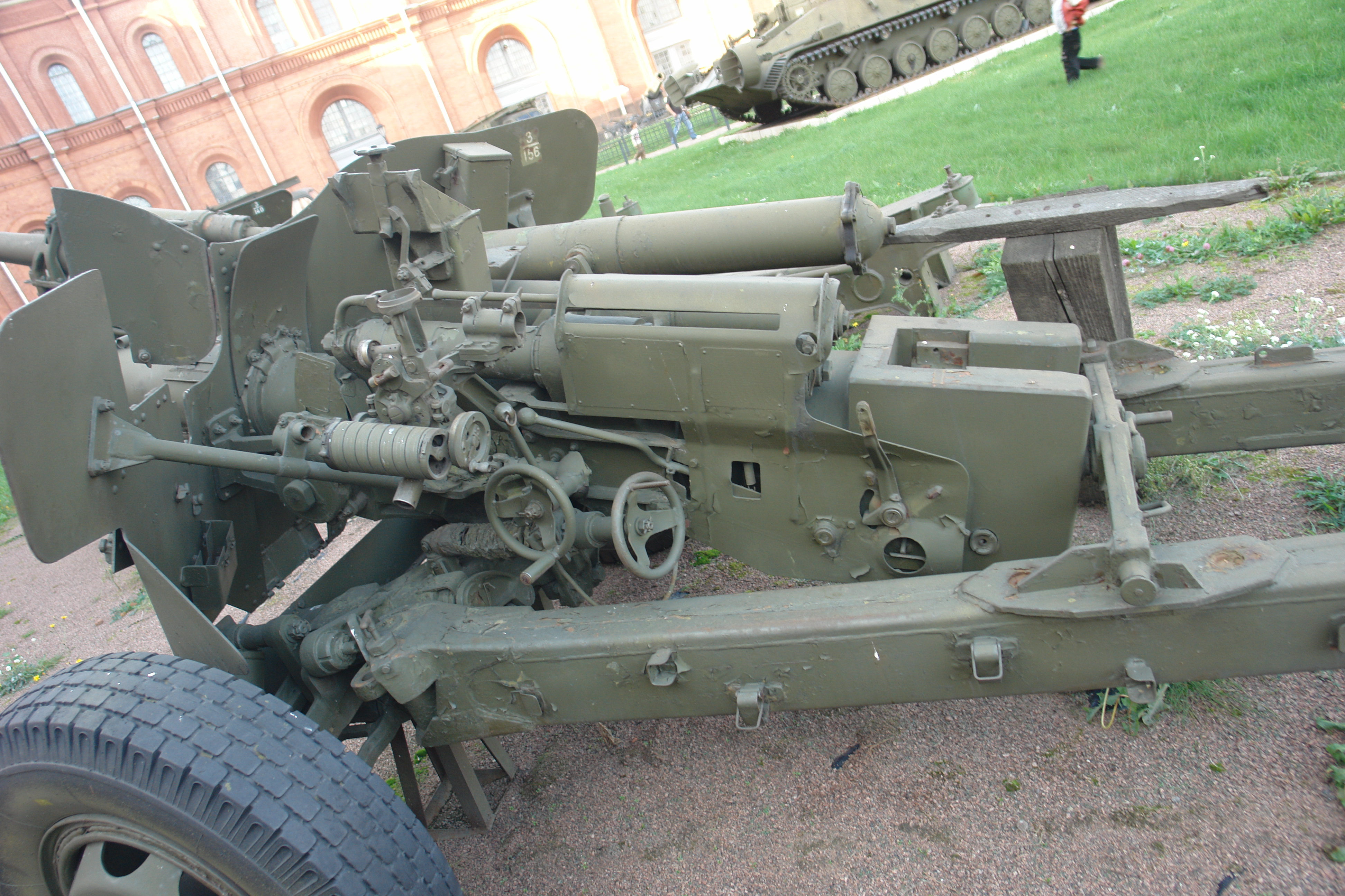 100-мм ПРОТИВОТАНКОВАЯ ПУШКА МТ-12(2А29) ПРИНЯТА НА ВООРУЖЕНИЕ В 1968 г. ГЛАВНЫЙ КОНСТРУКТОР Г.И.ЛУКЬЯНЧЕНКО. ДАЛЬНОСТЬ, М: СТРЕЛЬБЫ-8200, ПРЯМОГО ВЫСТРЕЛА - 1880. СКОРОСТРЕЛЬНОСТЬ - ДО 14 ВЫСТР/МИН МАССА ОРУДИЯ-3100. РАСЧЕТ 7 человек Военно-исторический музей артиллерии, инженерных войск и войск связи, Санкт-Петербург.